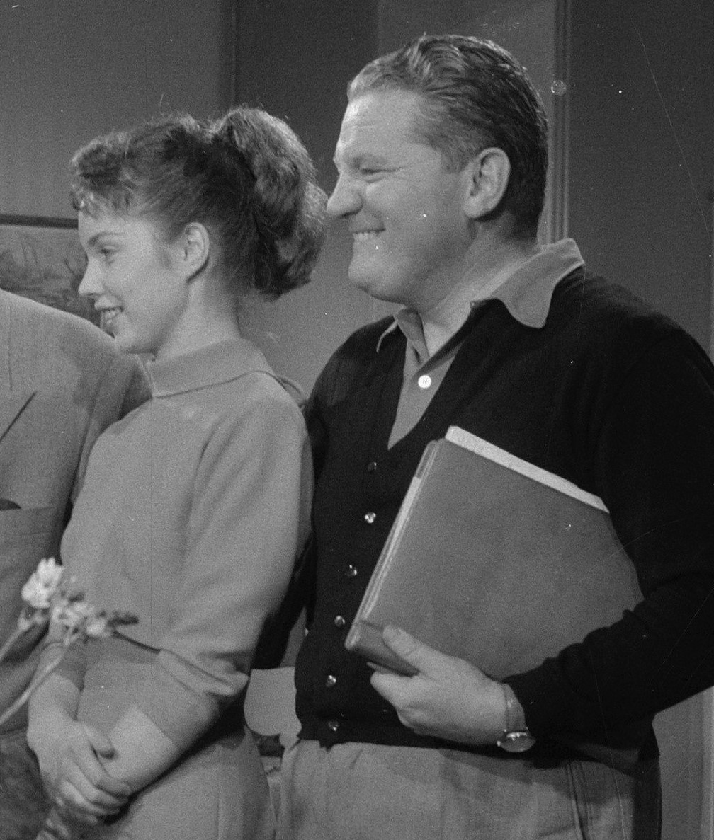 Gisela Fritsch & Alfred Bittins, 1957 Collectie / Archief : Fotocollectie Anefo Reportage / Serie : [ onbekend ] Beschrijving : Eerste opname Nederlandse kleurenspeelfilm in Cinetone studio te Rotterdam. $ Datum : 27 augustus 1957 Locatie : Rotterdam, Zuid-Holland Trefwoorden : Regisseurs, speelfilms Fotograaf : Pot, Harry / Anefo Auteursrechthebbende : Nationaal Archief Materiaalsoort : Negatief (zwart/wit) Nummer archiefinventaris : bekijk toegang 2.24.01.03 Bestanddeelnummer : 908-8984